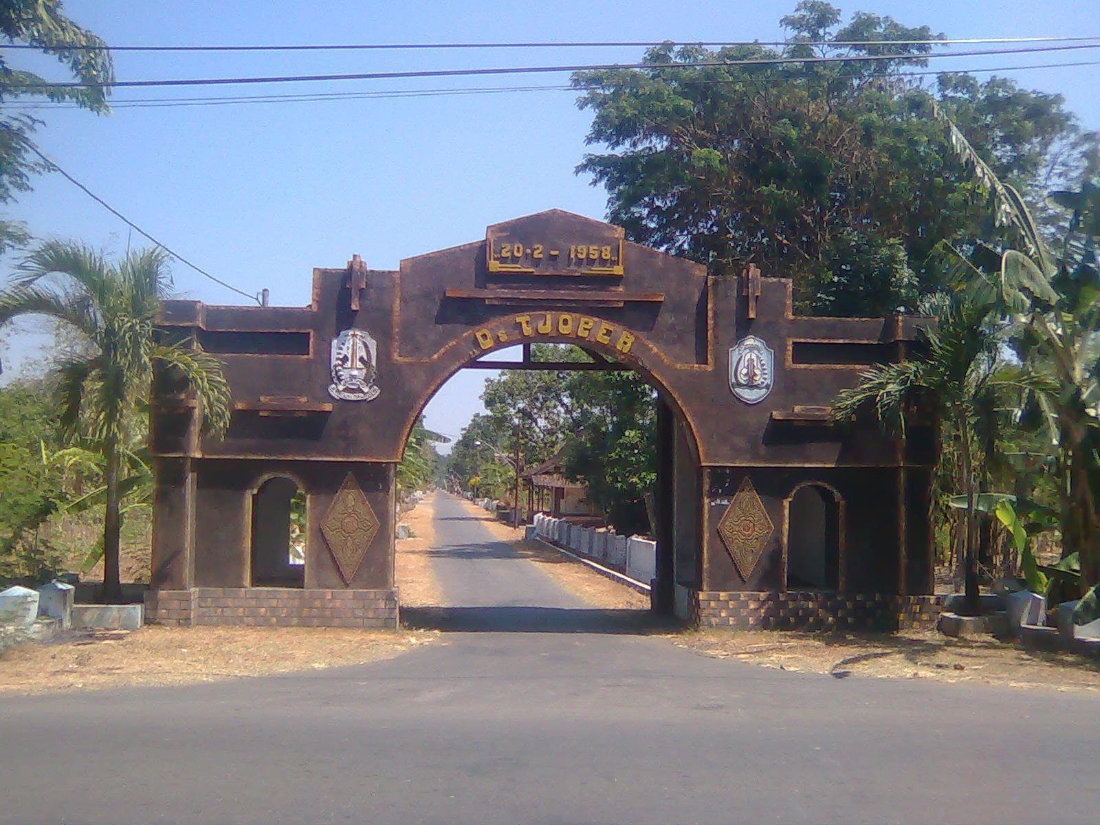 Gardu desa Coper, Ponorogo, Indonesia.